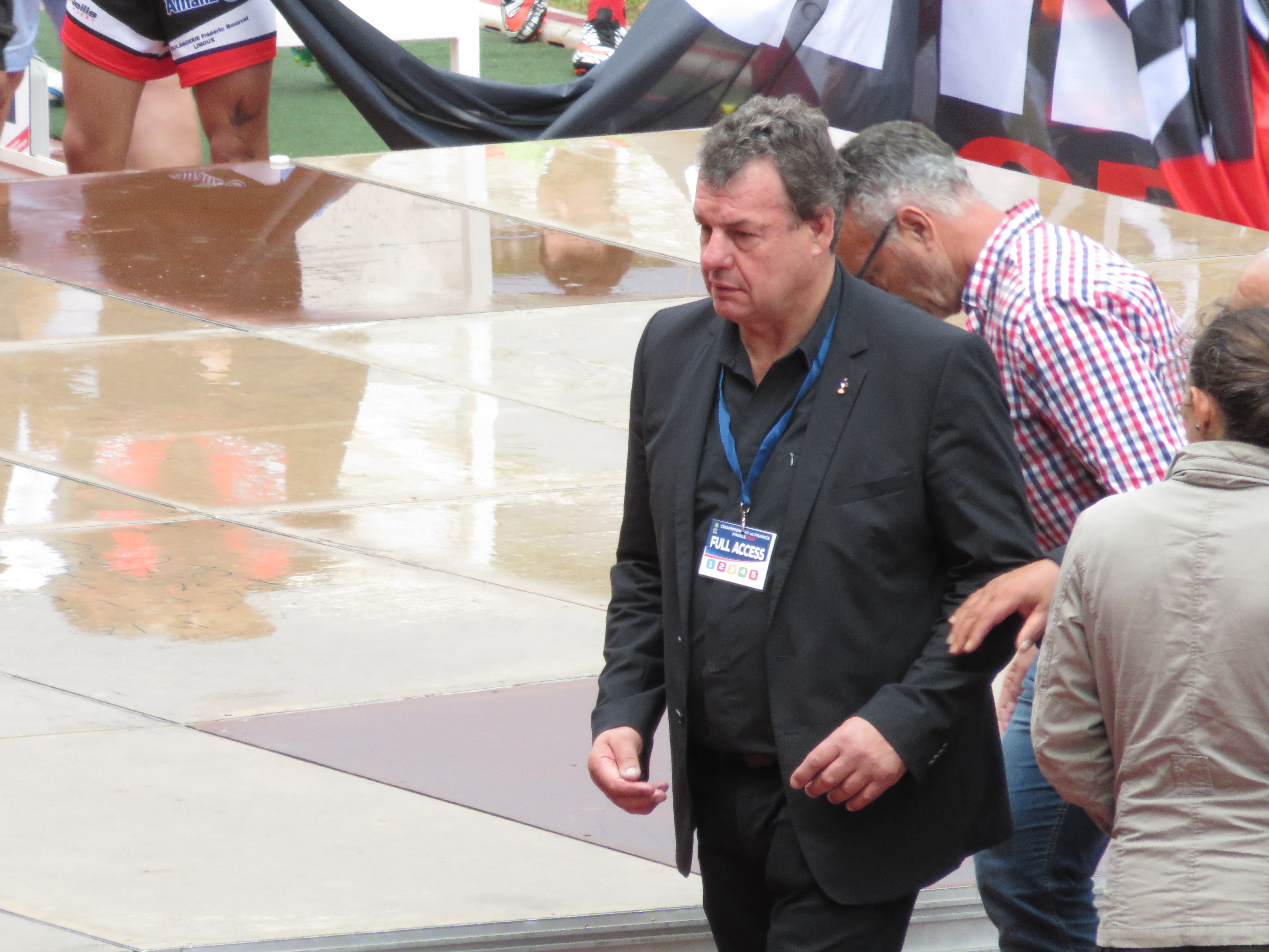 Finale du Championnat de France de rugby à XIII 2017